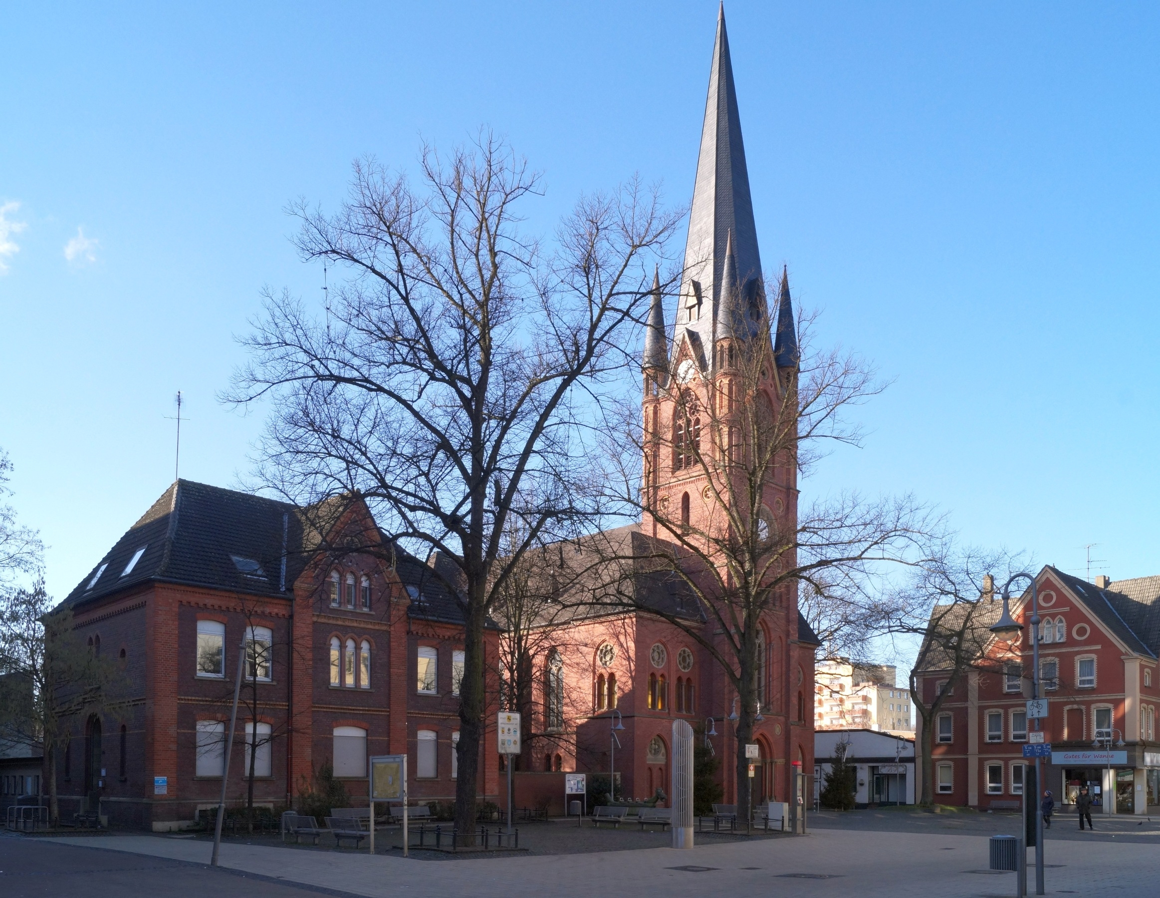 Christuskirche in Herne-Wanne, Hauptstrasse 245 This is a photograph of an architectural monument.